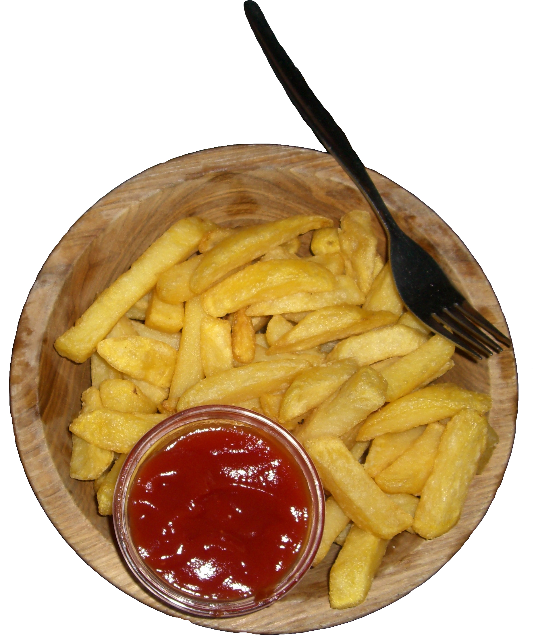 Stammtisch Ruhrgebiet Januar 2007 Oberhausen Pommes